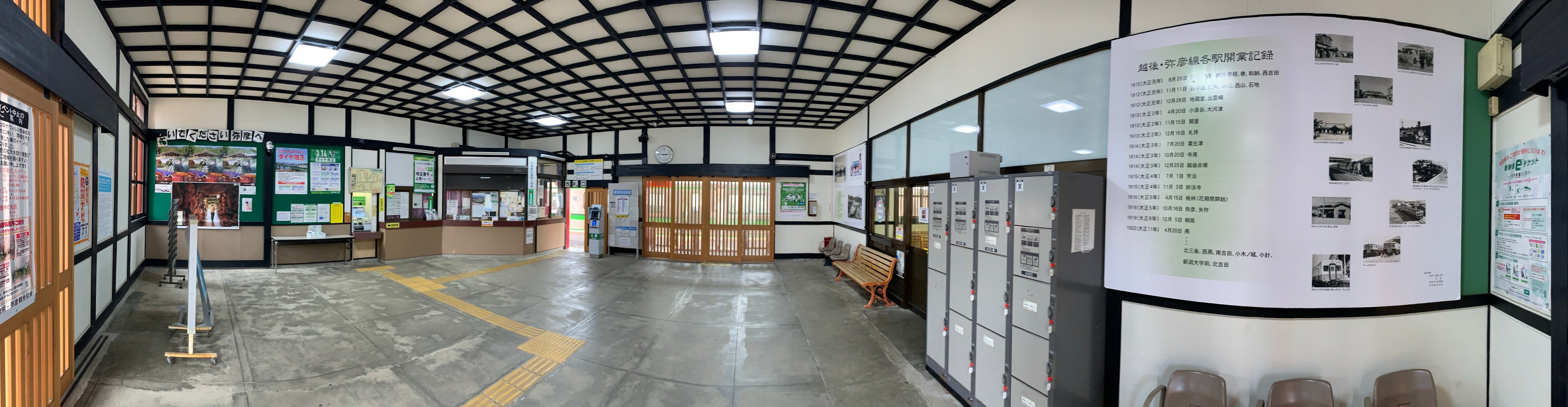 弥彦駅コンコース（2020年4月）